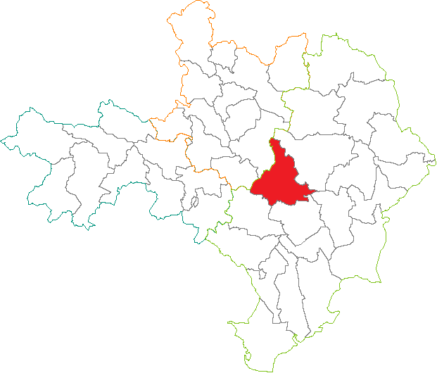 Situation du canton dans le département du Gard (France)